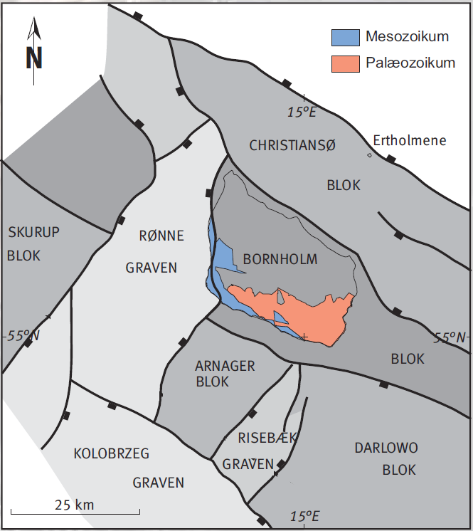 Forkastningsblokke omkring Bornholm, side 9. (profillinje fjernet fra original-tegning)